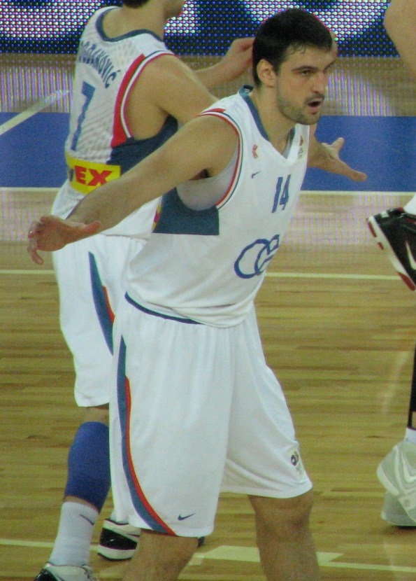 Dalibor Bagarić